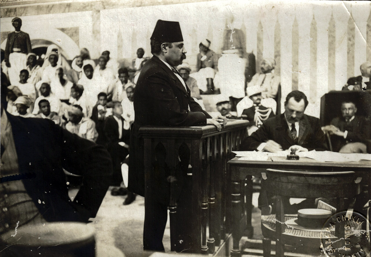 Abdeljelil Zaouche au tribunal pendant l'affaire du Djellaz